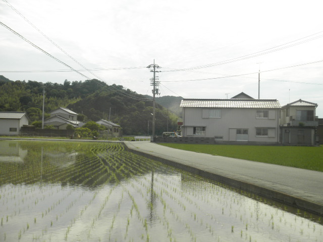 徳島県小松島市芝生町西居屋敷